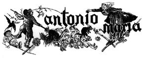 Bordalo - O António Maria